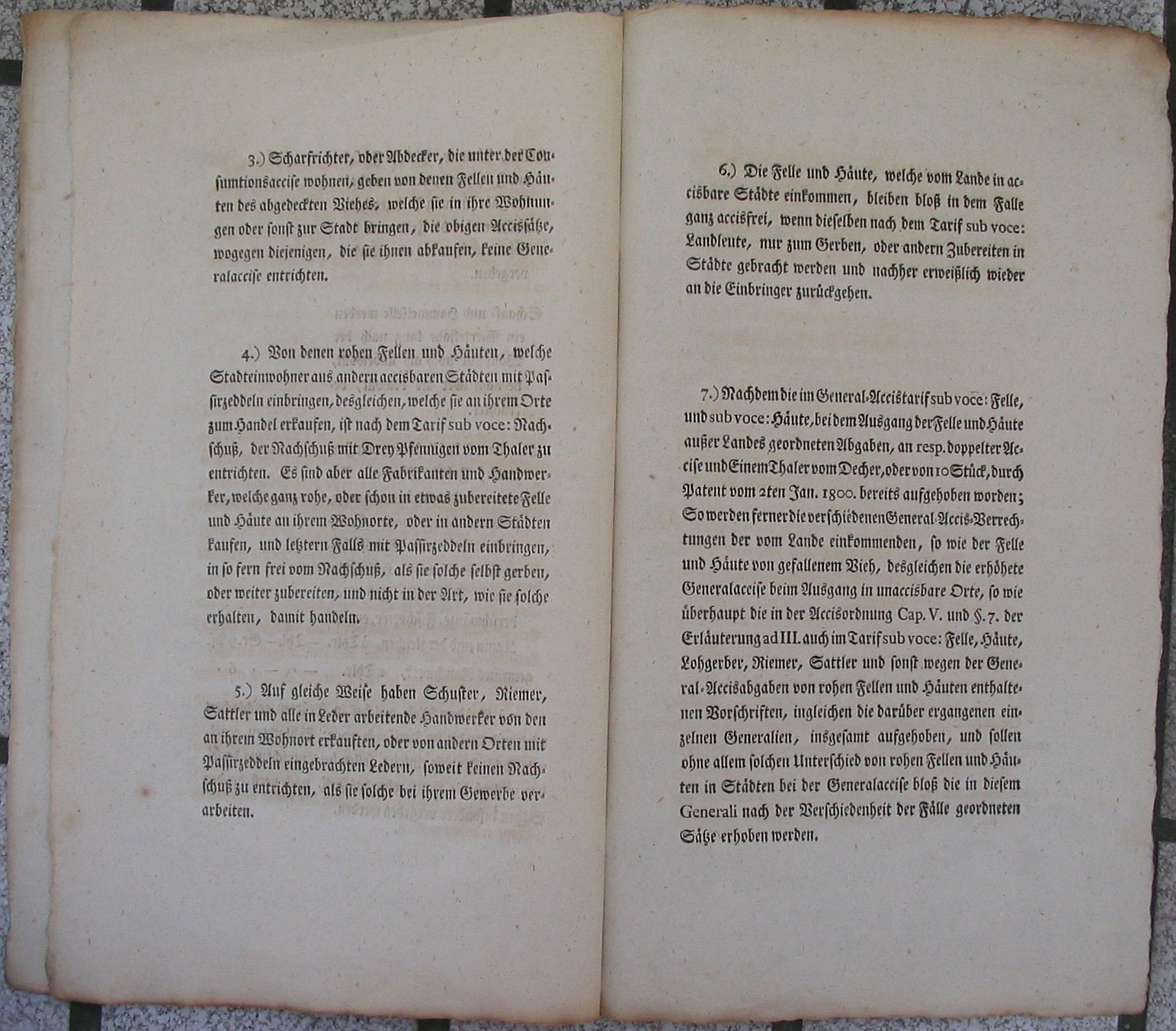 Preisedikt für Felle von 1801